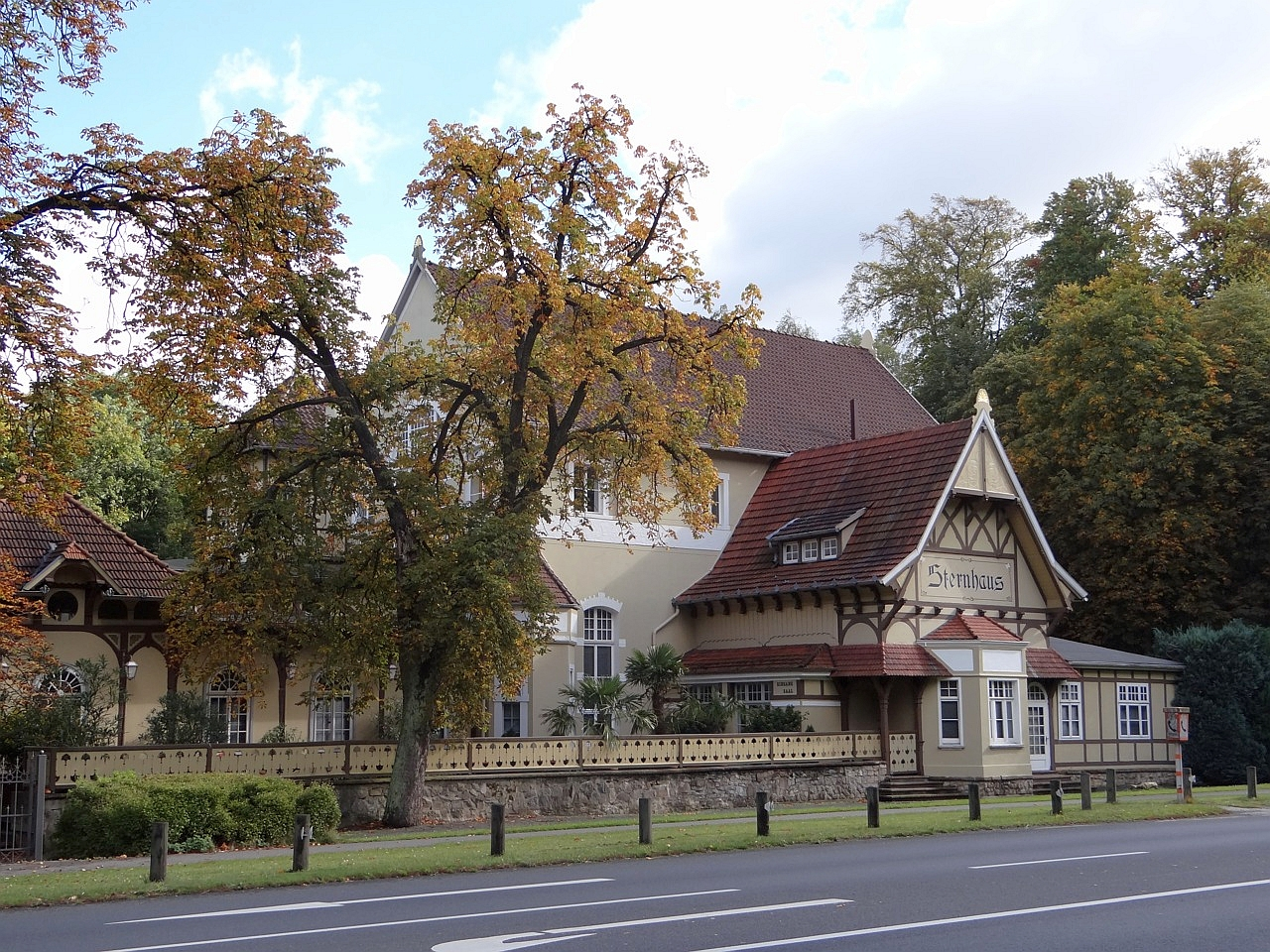 Das Sternhaus im Lechlumer Holz 2012, Straßenansicht.